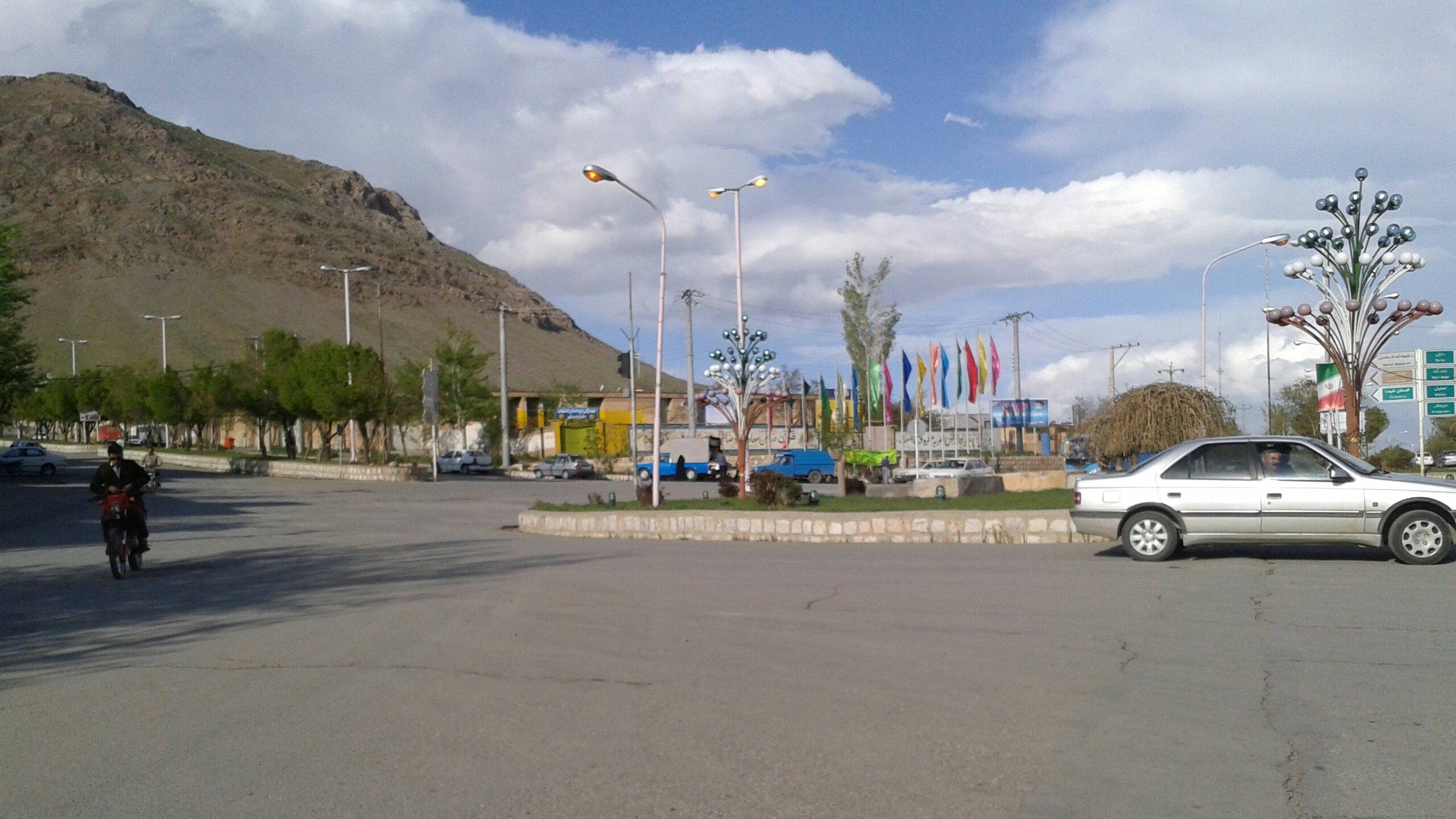 میدان استقلال فریدون شهر